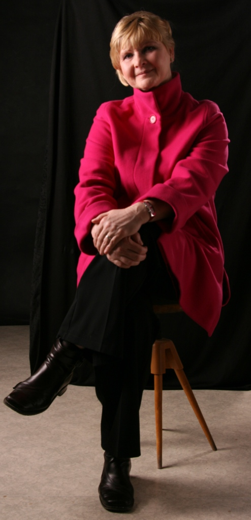 Stanislava Nopová